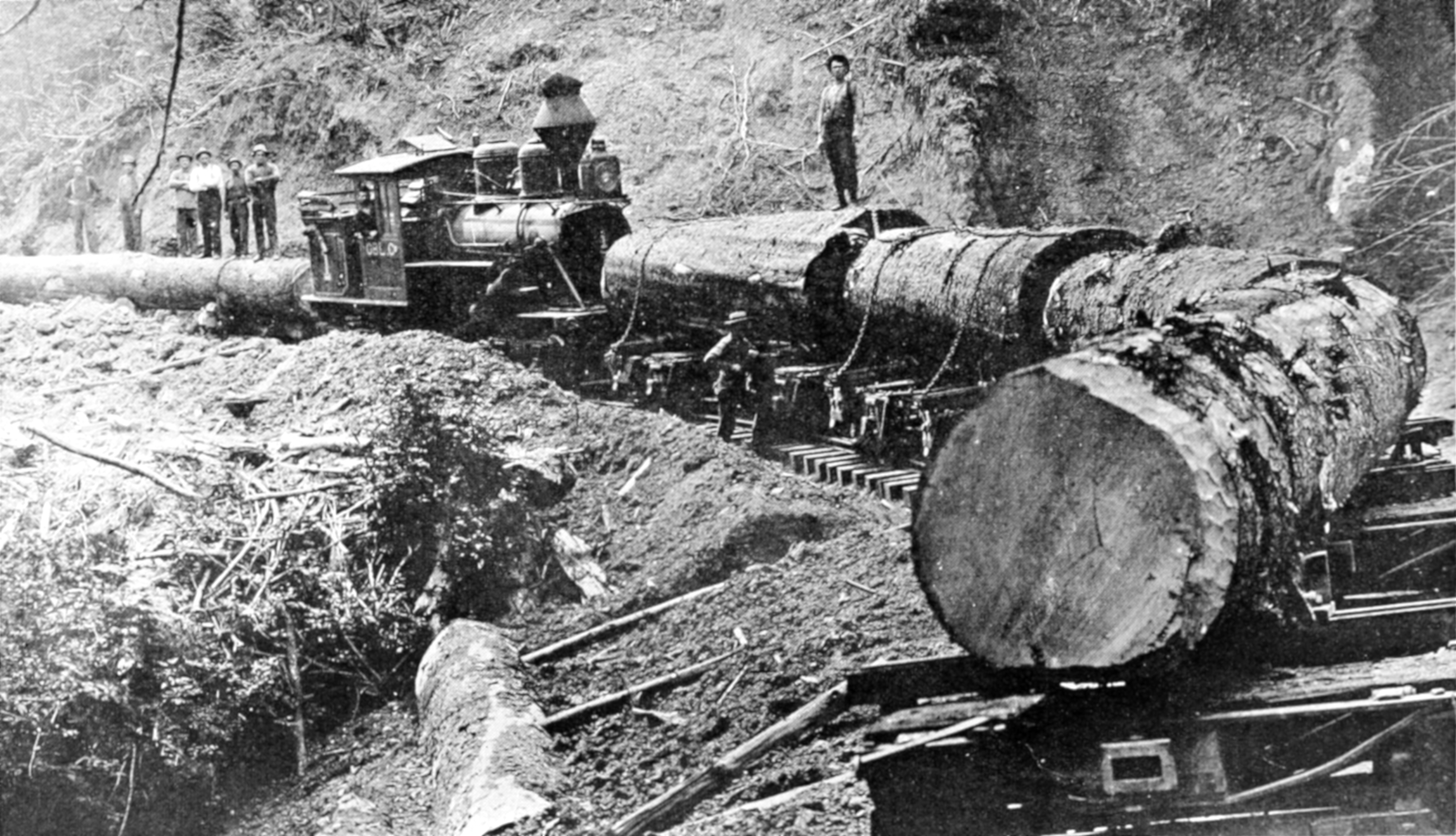 Lumbering in Oregon in 1910